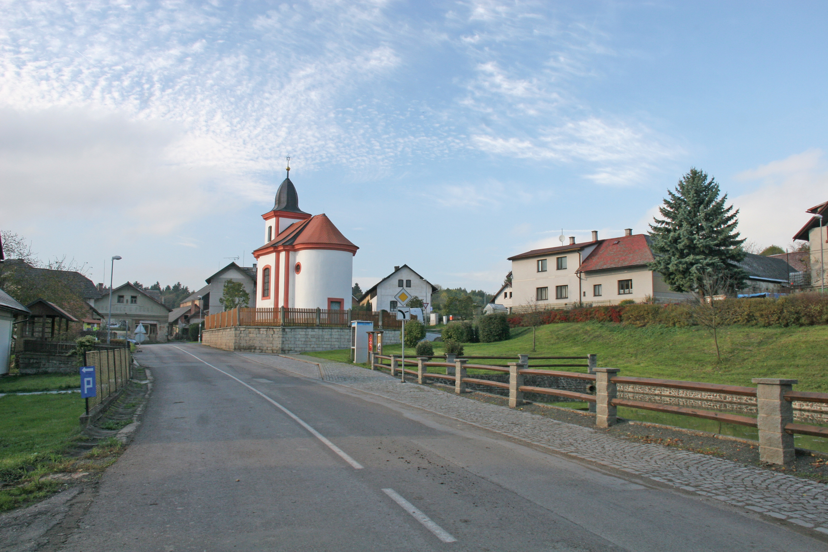 Kaple svatého Jana Nepomuckého, Bukvice (okres Jičín).